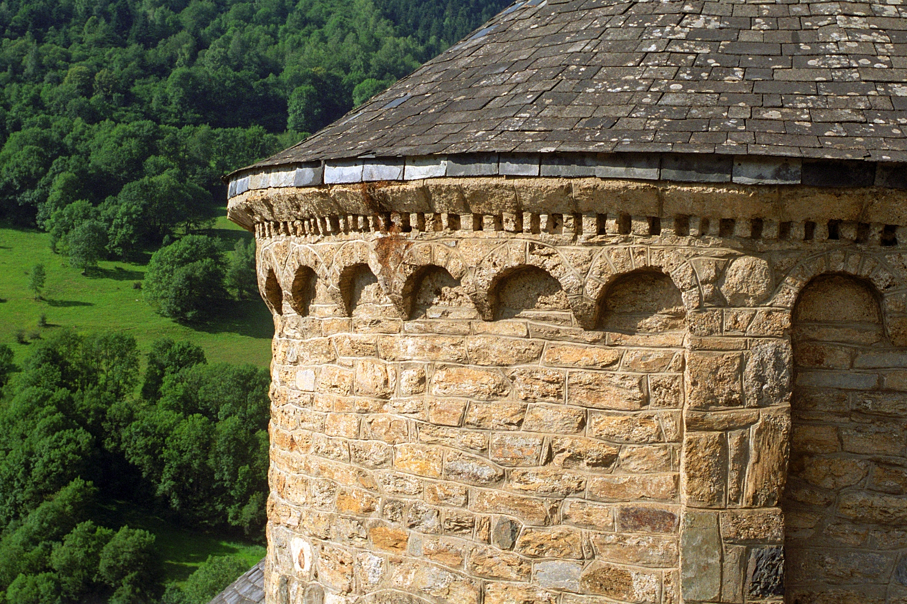 France - Pyrénées - Haute-Garonne - Église de Saint-Aventin